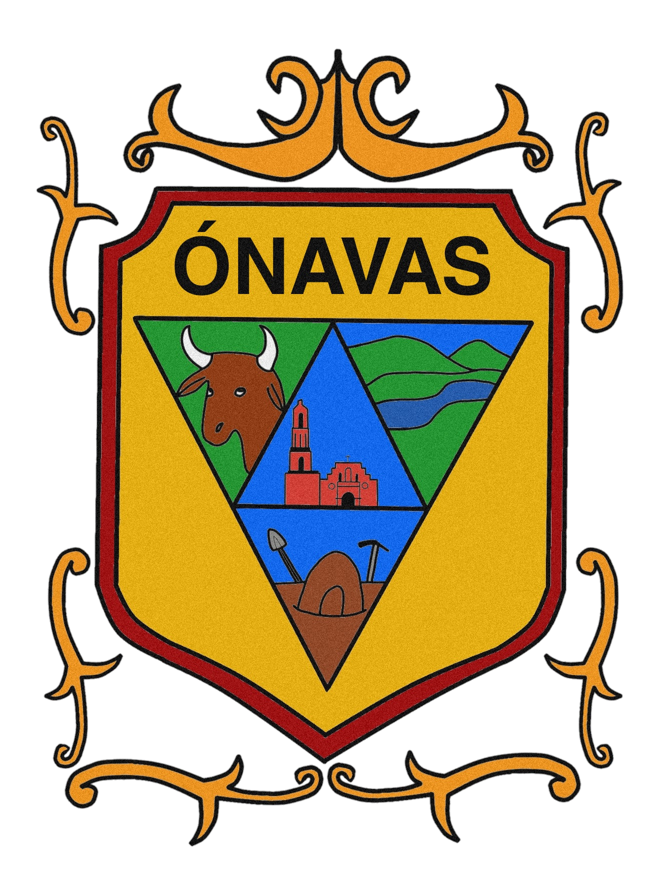 Escudo del municipio sonorense.